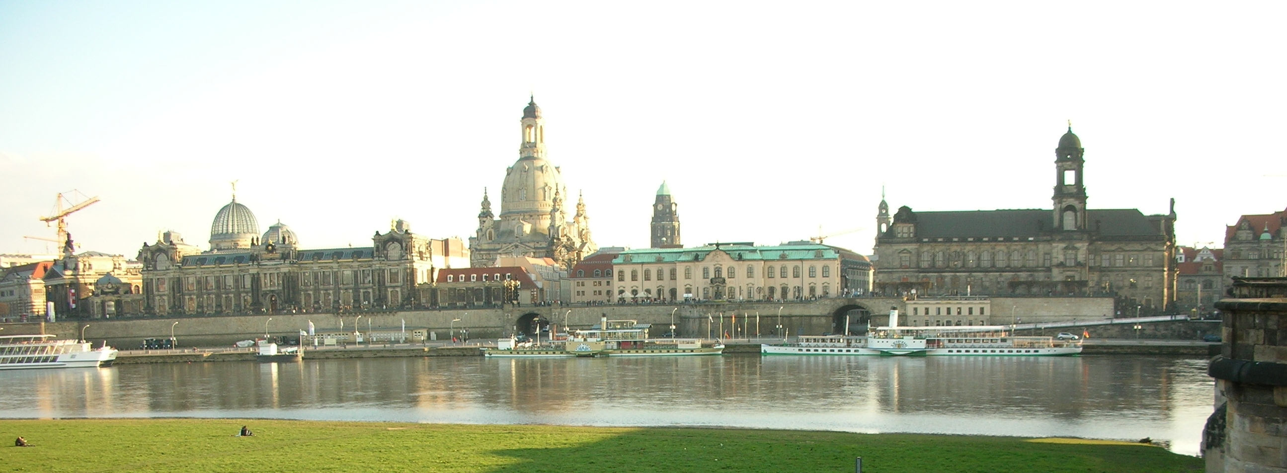 Brühlsche Terrasse, im Hintergrund Frauenkirche und Kunstakademie mit "Zitronenpresse", im Vordergrund Elbe mit Elbdampfern und Elbwiese